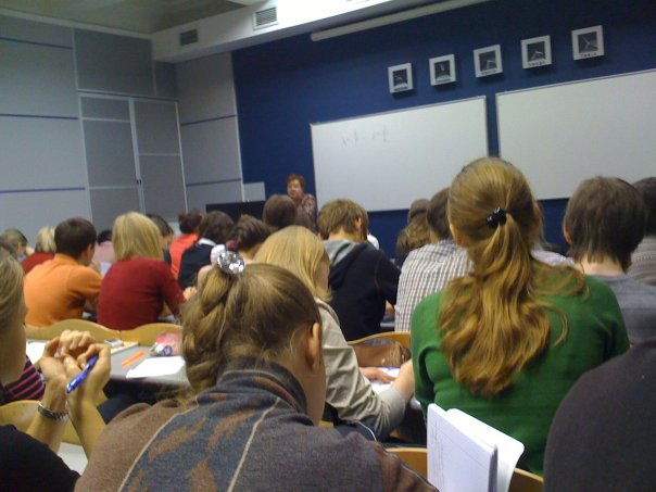 На обычной лекции экономического факультета.